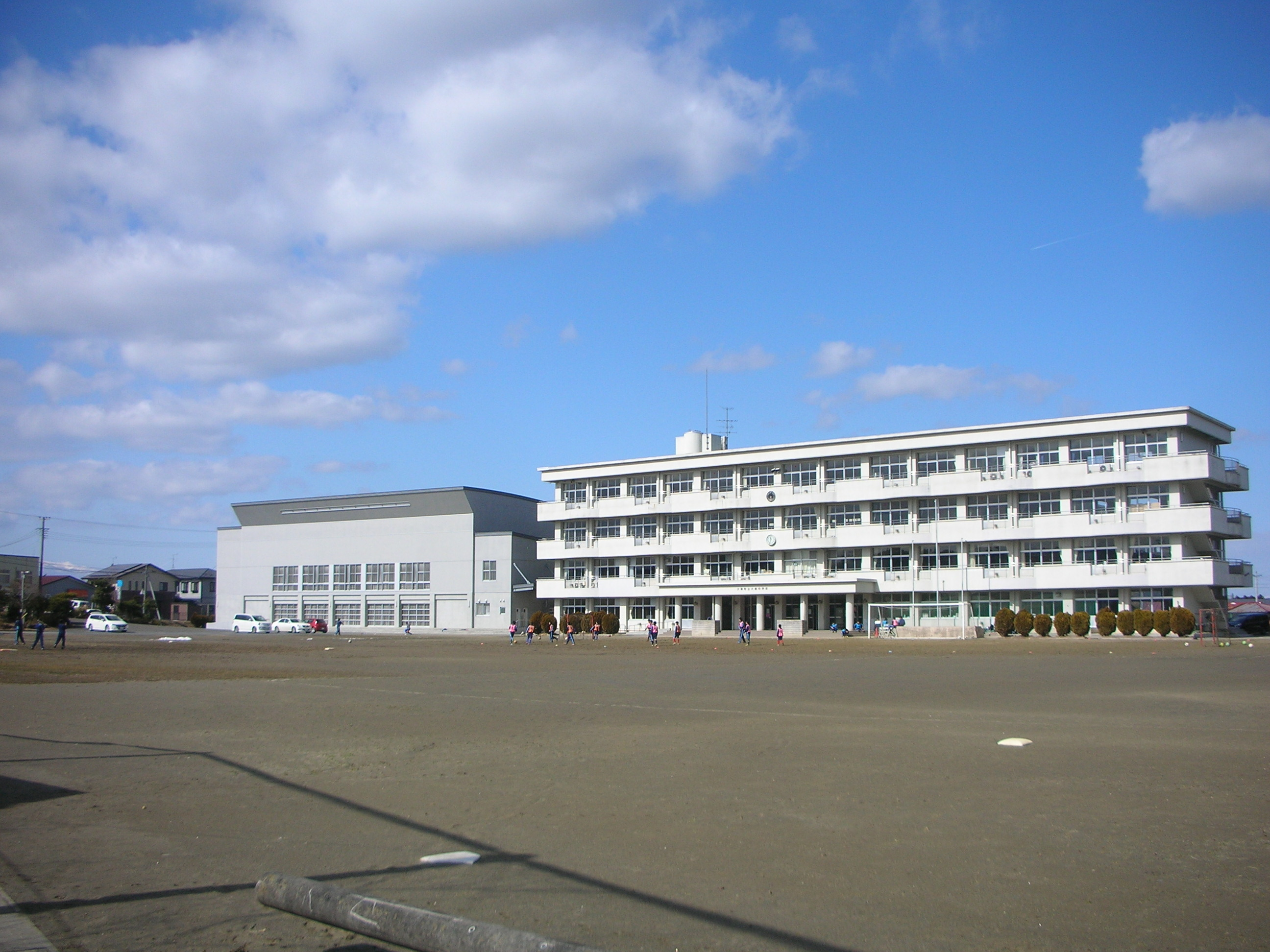 大郷中学校